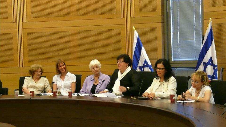 מרינה סולודקין ופרופ' אסתר הרצוג בכנסת